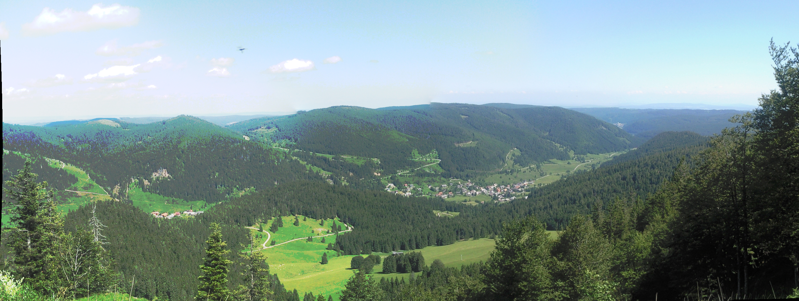 Spießhorn Panorama